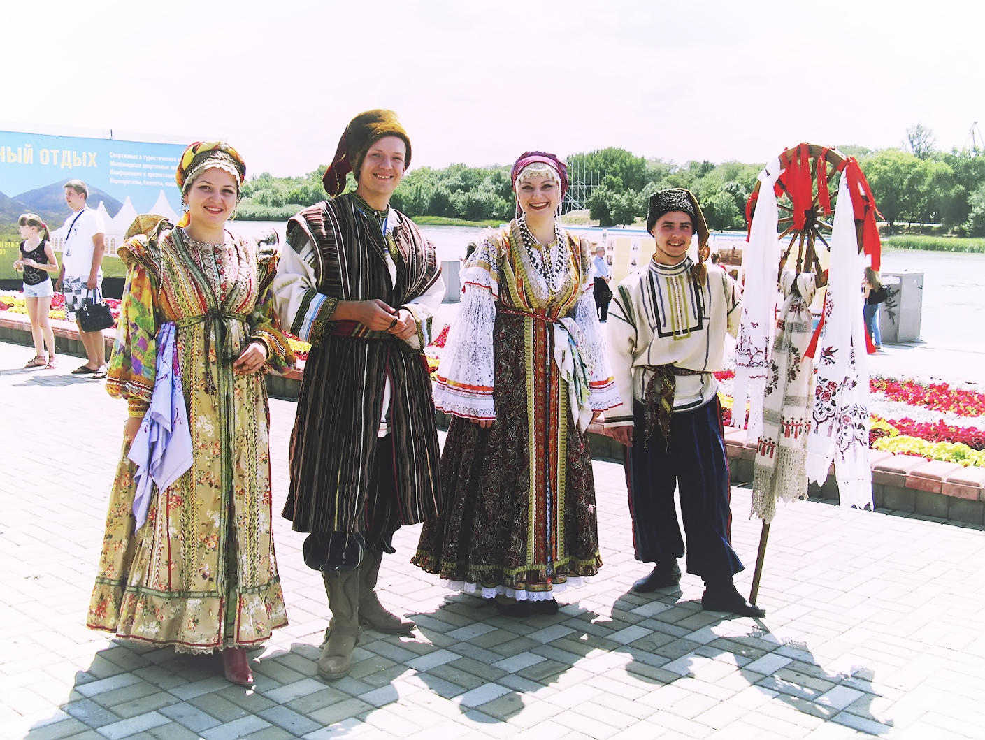 Ростовские казаки (Ростов-на-Дону)